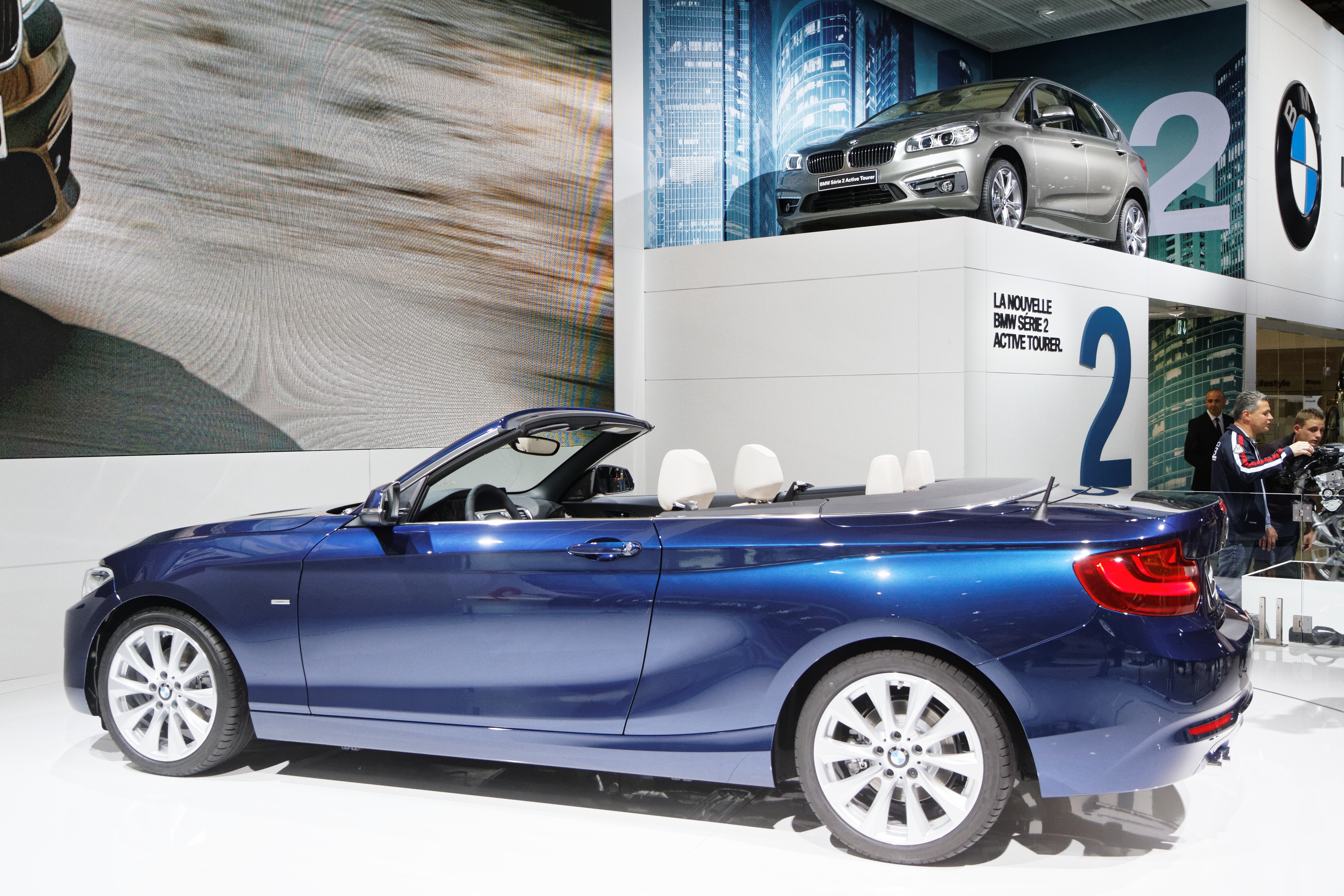 Une BMW Serie 2 Cabriolet présentée lors du mondial de l'automobile de Paris 2014.